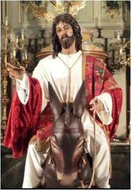 Imagen de Nuestro Padre Jesús del Amor en su entrada triunfal en Jerusalén